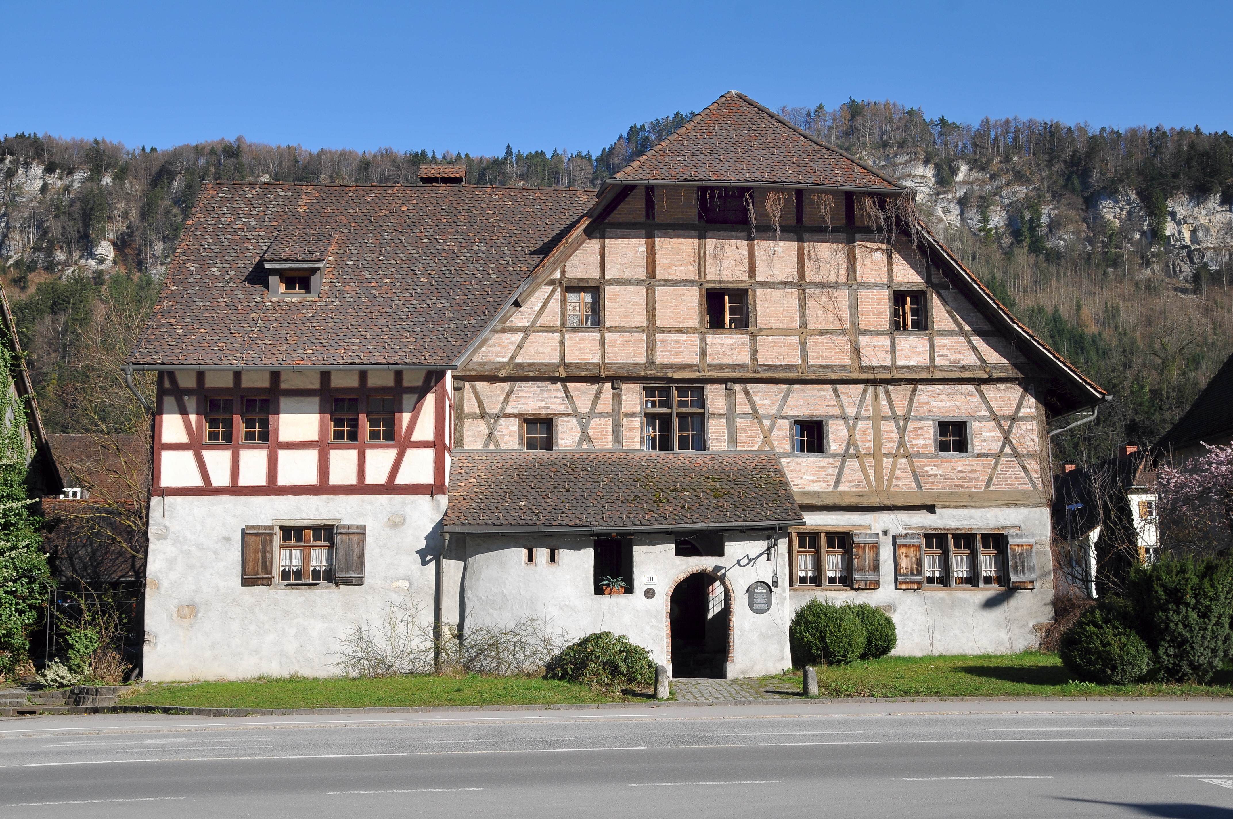 Feldkirch, Levis Reichsstraße Nr.111 ehemaliges Siechenhaus, heute Jugendherberge.